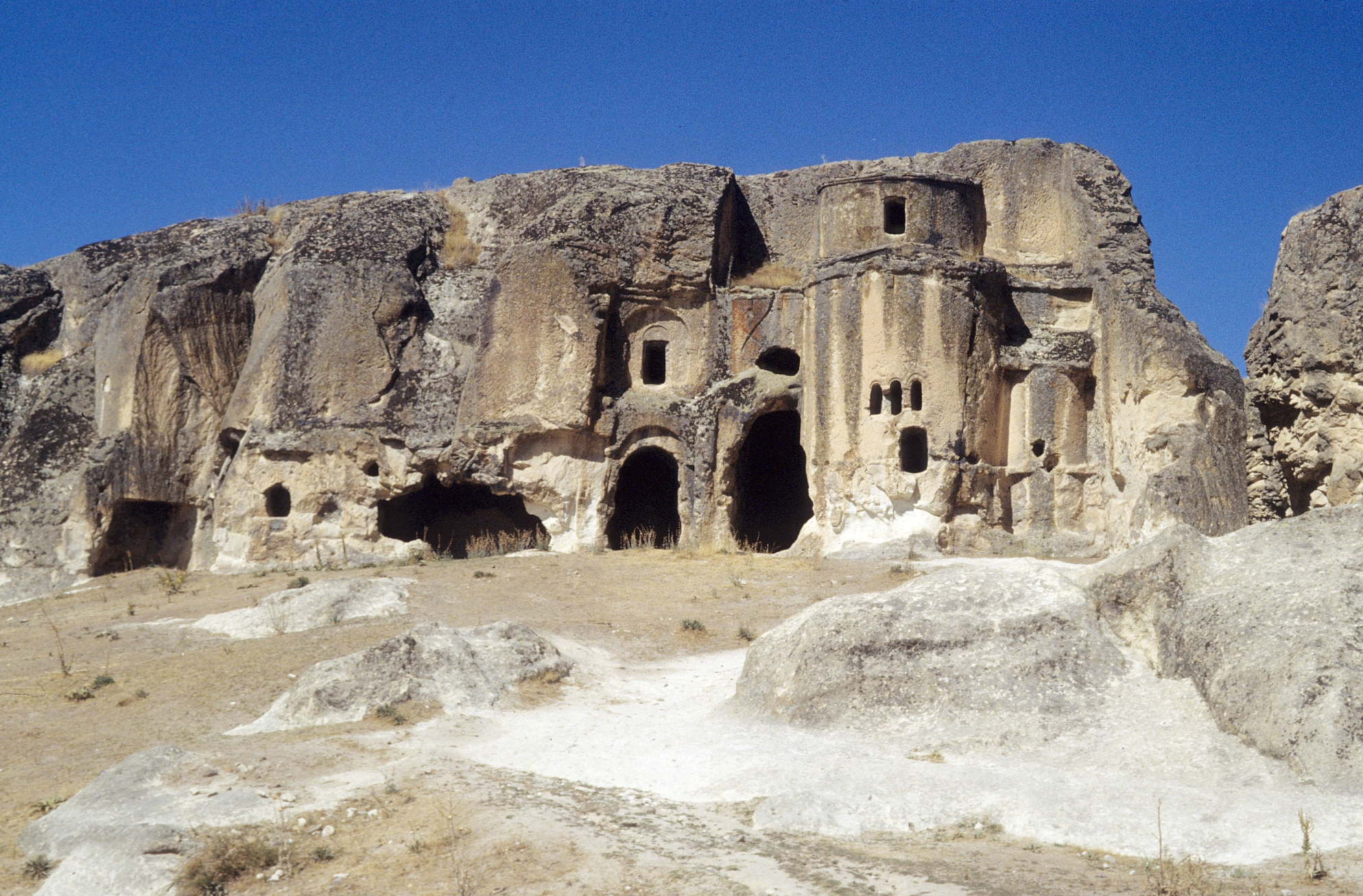 Byzantinische Felsenkirche in Ayazin bei Afyon, Zentraltürkei